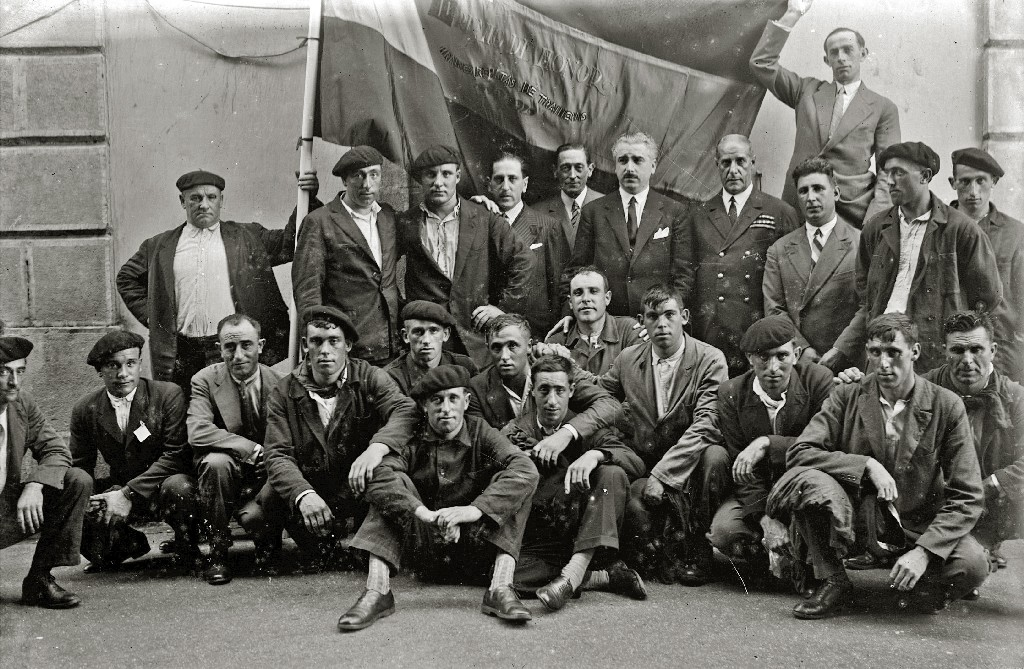 Título original: Tripulación de la trainera San Pedro 'Aita Sanpedrukua' celebrando la Victoria de la Bandera de la Concha (3/3) Localización: San Sebastián (Guipúzcoa)